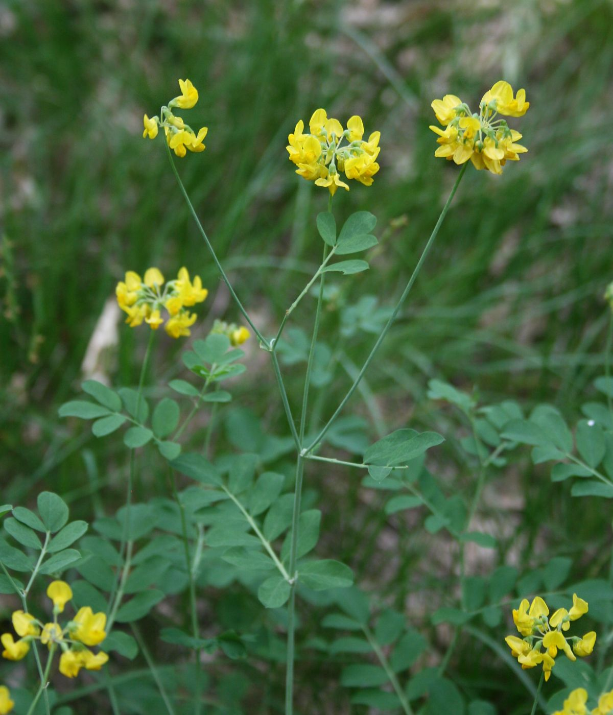 Berg-Kronwicke (Coronilla coronata), Hülsenfrüchtler (Fabaceae), Schmetterlingsblütler (Faboideae) - Ungarn/Magyarország/Hungary: Pest megye, Szénás-Hügel bei Pilisszentiván